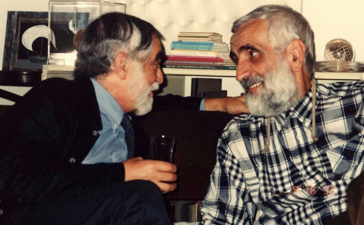 איזיקה גאון והמעצב האיטלקי אנצו מארי, בביתו של גאון בירושלים, 1995